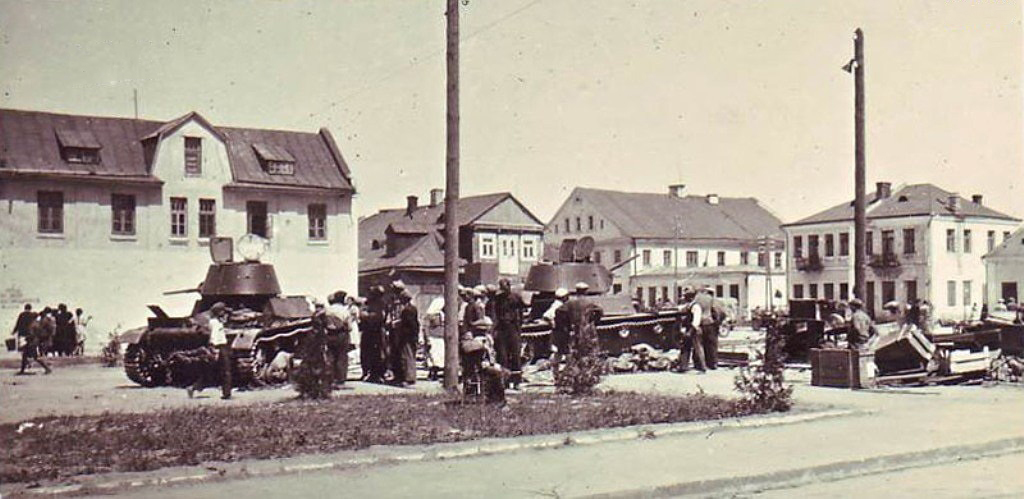 Беларуская (тарашкевіца): Кобрынь (Kobryń), пляц Рынак (plac Rynak)